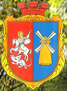 Герб села Четвертня